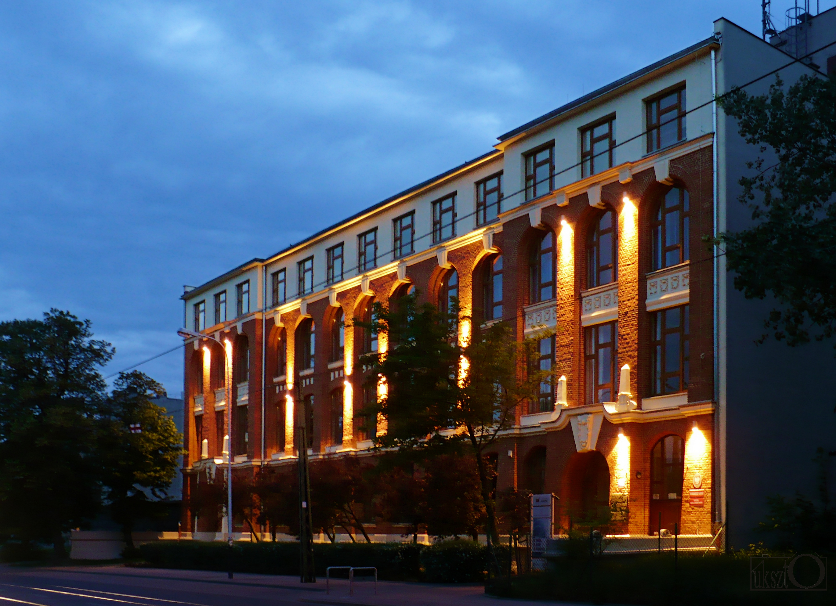 Łódź, ul. Pomorska, Talmud Tora